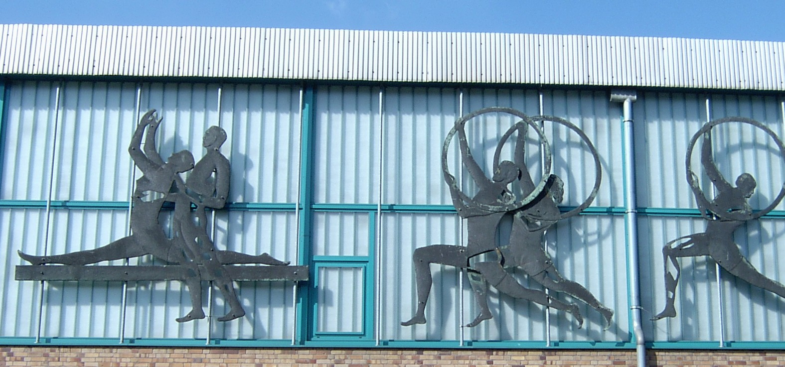 "Sport-Fries" (Ausschnitt) von Wolfgang Frankenstein (1918-2010) am Sportforum Hohenschönhausen (1970, Kupfer getrieben, Gesamtlänge 5m x 80m)